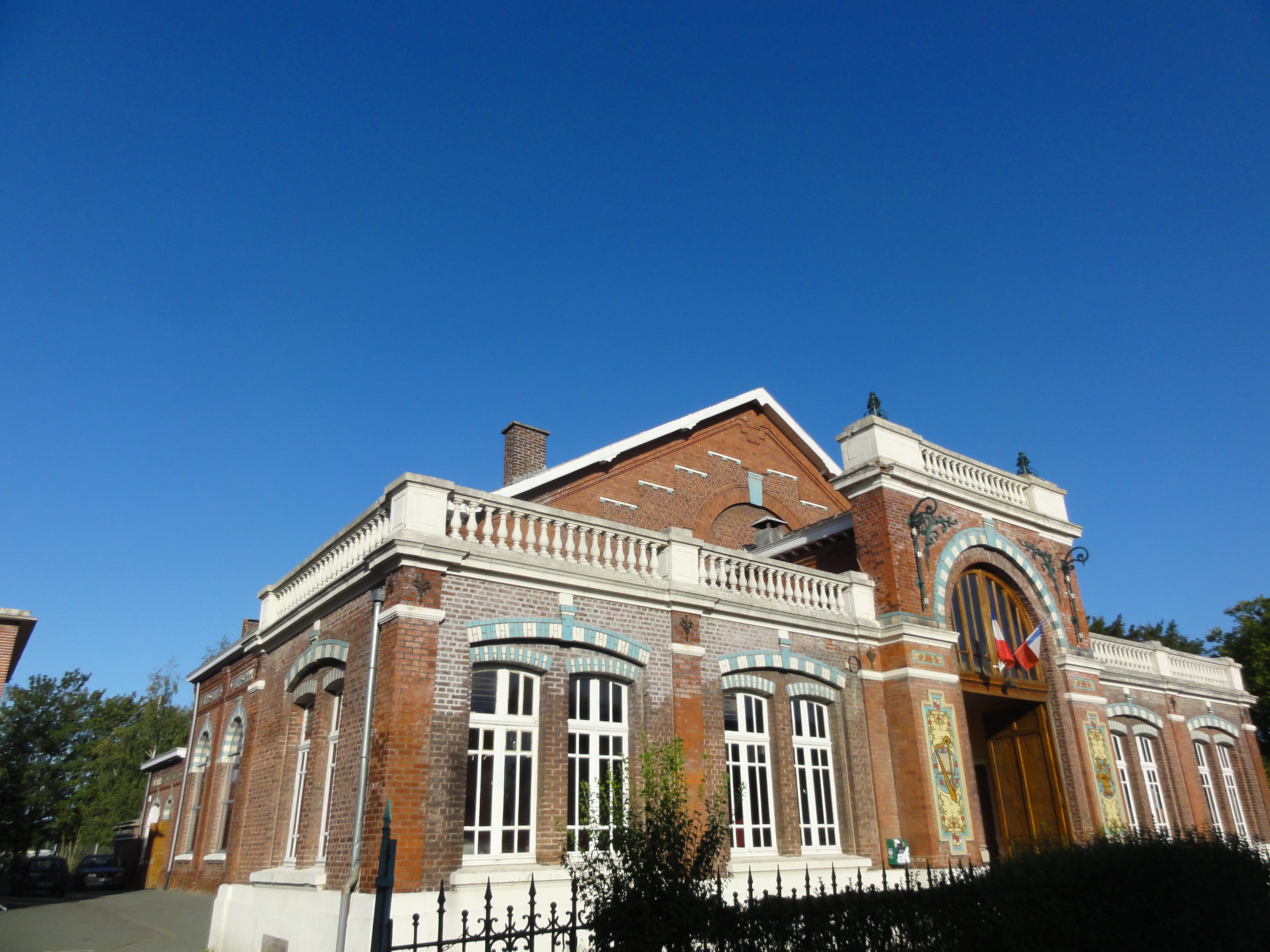 Salle des fêtes des cités de la fosse Arenberg de la Compagnie des mines d'Anzin dans le bassin minier du Nord-Pas-de-Calais, Wallers, Nord, Nord-Pas-de-Calais, France. .